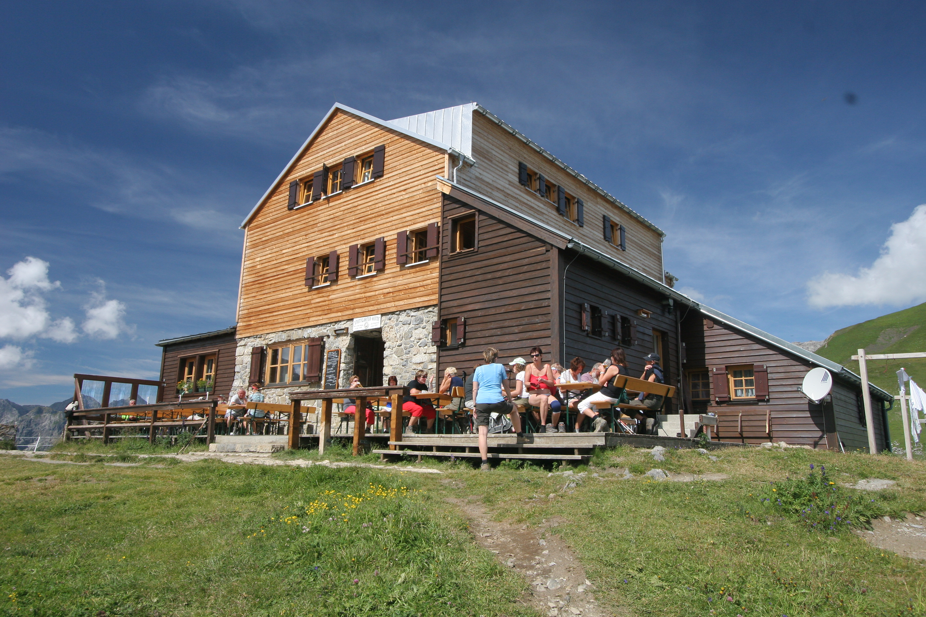 Stuttgarter Hütte 8.2013